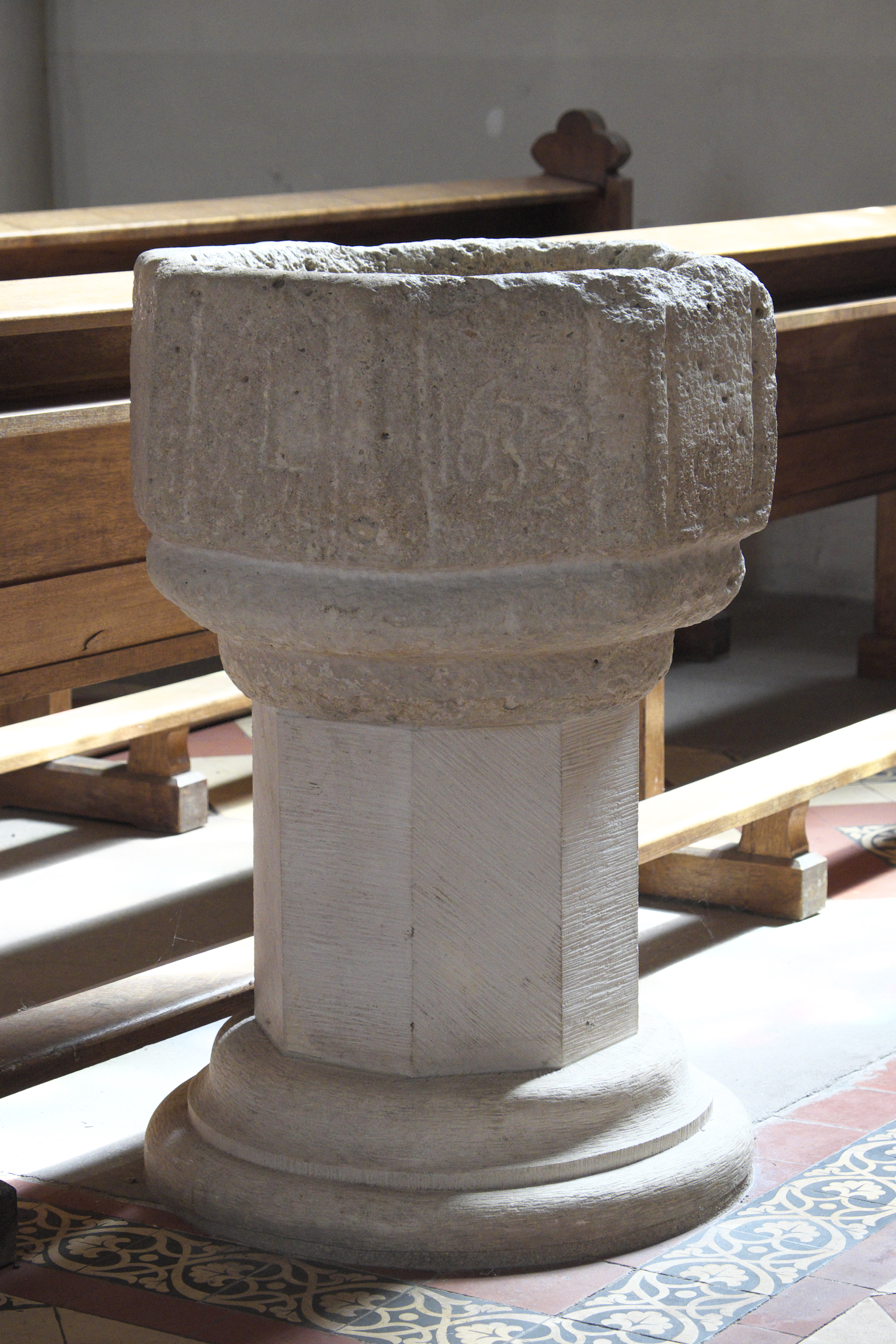 Katholische Kirche Notre-Dame in Senonches im Département Eure-et-Loir (Centre-Val de Loire/Frankreich), Taufbecken mit der Jahreszahl 1633